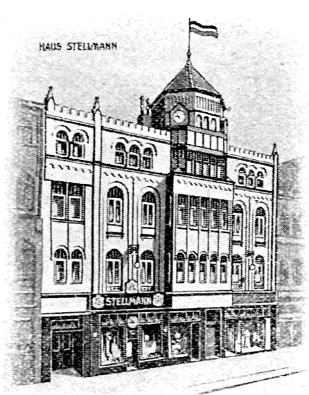 Das in den Jahren von 1907 bis 1908 von dem Architekten Wilhelm Mackensen für den späteren Hof-Uhrmacher Moritz Stellmann senior, Inhaber der Firma M. Stellmann, unter der Adresse Königstraße 53 in Hannover errichtetes Haus Stellmann